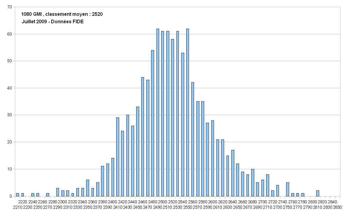 Répartition du nombre de Grand Maîtres Internationaux par tranche de 10 points ELO au 1 Juillet 2009. Moyenne = 2520 ELO.